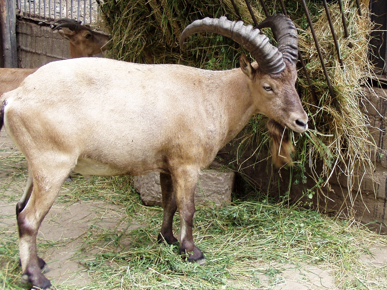 Capra caucasica-male (Prague Zoo)